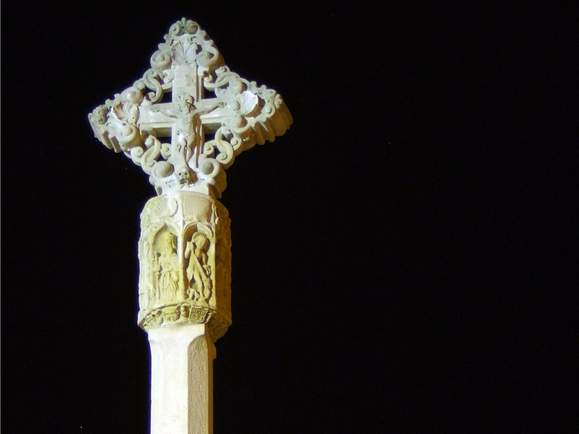 3936-MH Aquesta creu de terme data del segle XIV, està situada a la Plaça del Sitjar, abans es trobava a la sortida de la localitat. Hi veiem representats, en una cara la figura del Crist Redemptor i en l'altra la figura de Maria, envoltada d'àngels, tenint les puntes de la creu unides per ornaments entrellaçats. La llanterna està formada per un fris amb vuit capelletes amb diferents sants a cada una d'elles, entre els quals es pot identificar a sant Miquel, sant Joan, sant Roc i sant Pere. Totes aquestes figures estan ornamentades amb dosserets que dibuixen petites columnes, llaçades, creus, etc. i recolzades sobre una cornisa decorada amb àngels, escuts i motius geomètrics.